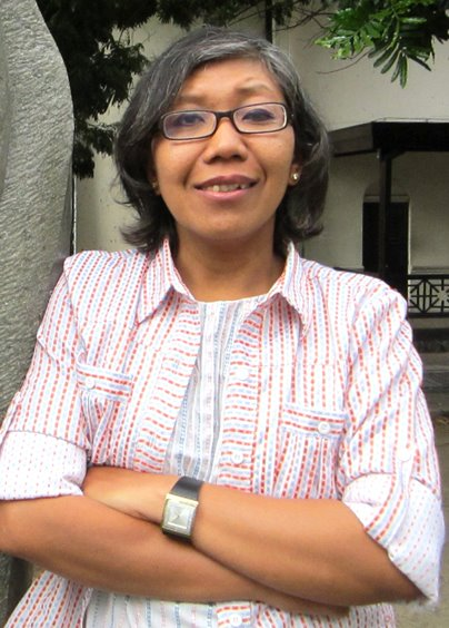 Yustina Neni Nugraheni